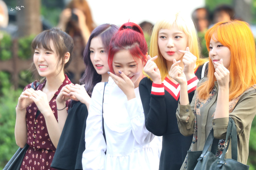 2016년 9월 9일 KBS 방송국 앞에서 레드벨벳.